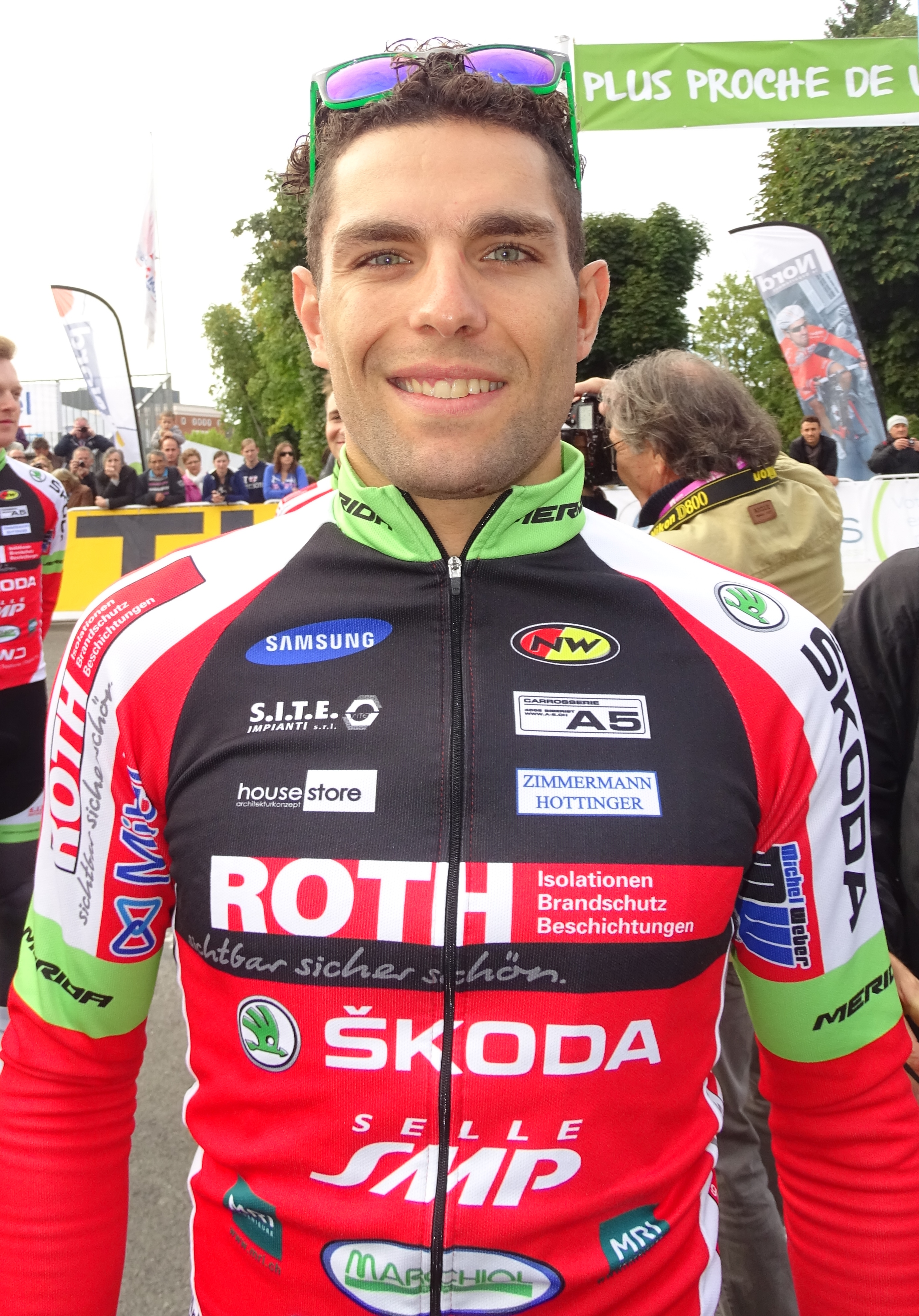 Reportage réalisé le dimanche 6 septembre à l'occasion du départ et de l'arrivée du Grand Prix de Fourmies 2015 à Fourmies, Nord-Pas-de-Calais, France.